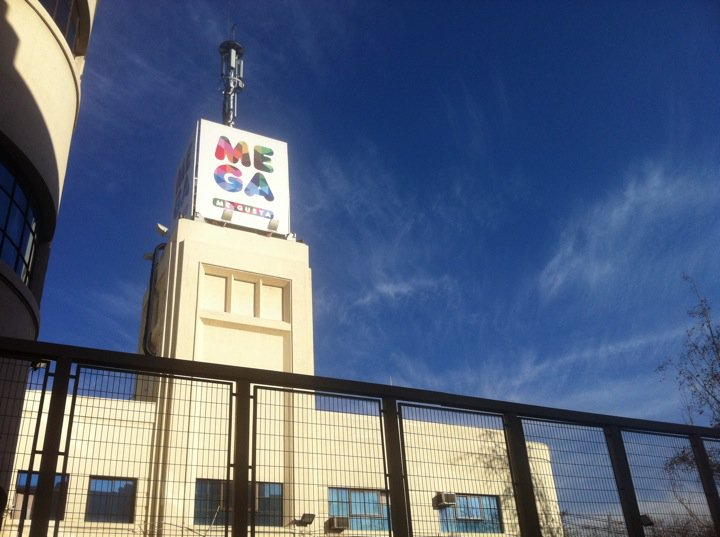 El canal de televisión Mega, ubicado en Av. Vicuña Mackenna 1348, Ñuñoa, Santiago de Chile. Logotipo utilizado desde el 7 de octubre de 2010.